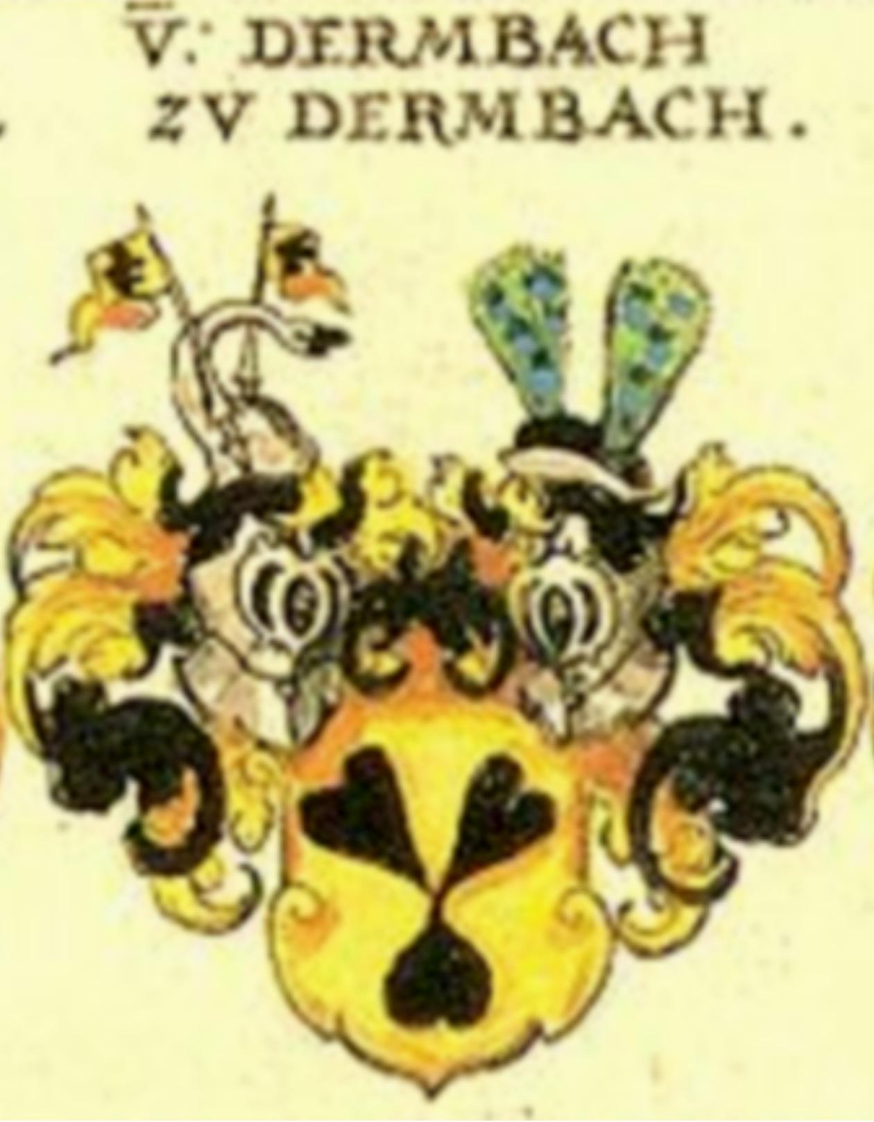 Wappen der von Dernbach zu Dernbach, Ausschnitt aus: Johann Siebmacher: New Wappenbuch, eingescannt aus: Horst Appuhn (Hrsg.), Johann Siebmachers Wappenbuch. Die bibliophilen Taschenbücher 538, 2. verb. Aufl , Dortmund 1989 Hessische, Blatt 140